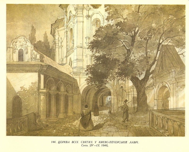 Церква Всіх Святих у Києво-Печерській лаврі. Тарас Шевченко, 1846 р., Сепія